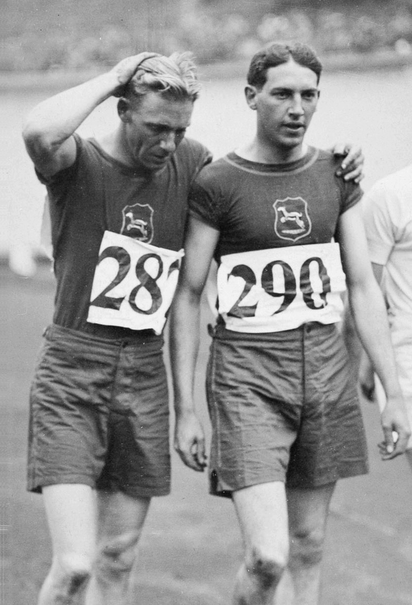 Olympische Spelen Amsterdam, 1928 : Atleten na de finale van de 110 meter horden. Links de Zuidafrikaan Sidney Atkinson, winnaar van het goud.